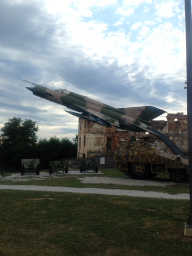 Ici un MiG-21 des forces de l'armée de l'air et de défense aérienne de la République de Croatie